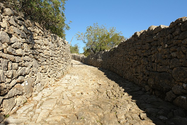 "Calçadinha" de São Brás de Alportel - Troço B